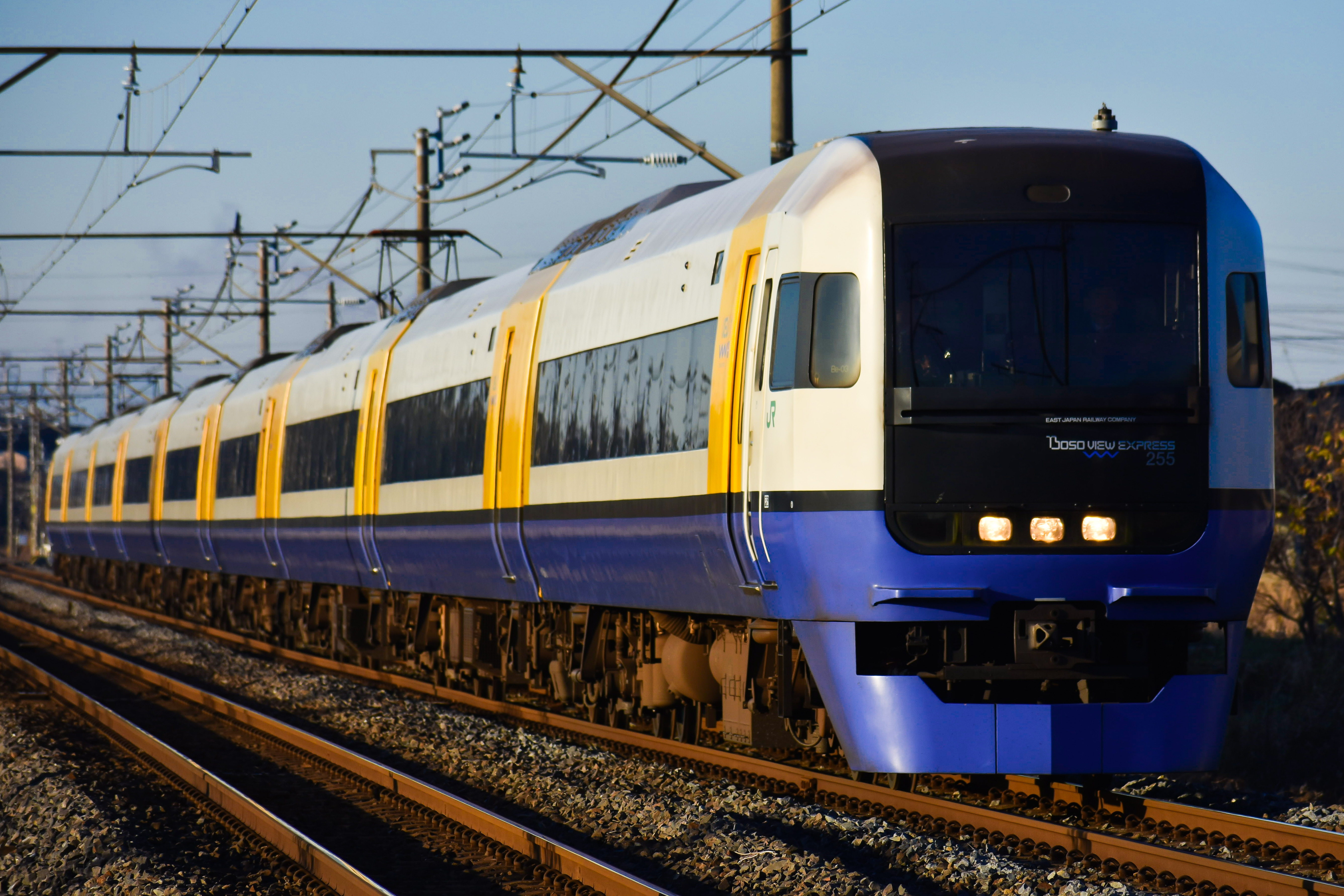 日本某所にて撮影